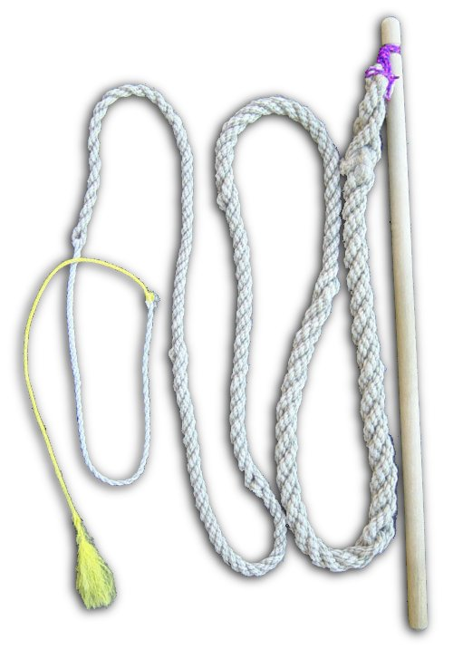 Foto einer Innerschweizer Geissel